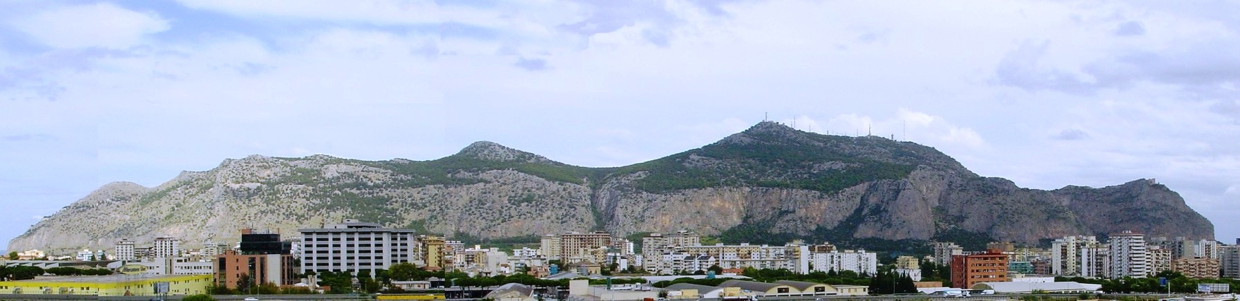 Monte Pellegrino, Palermo, Italy